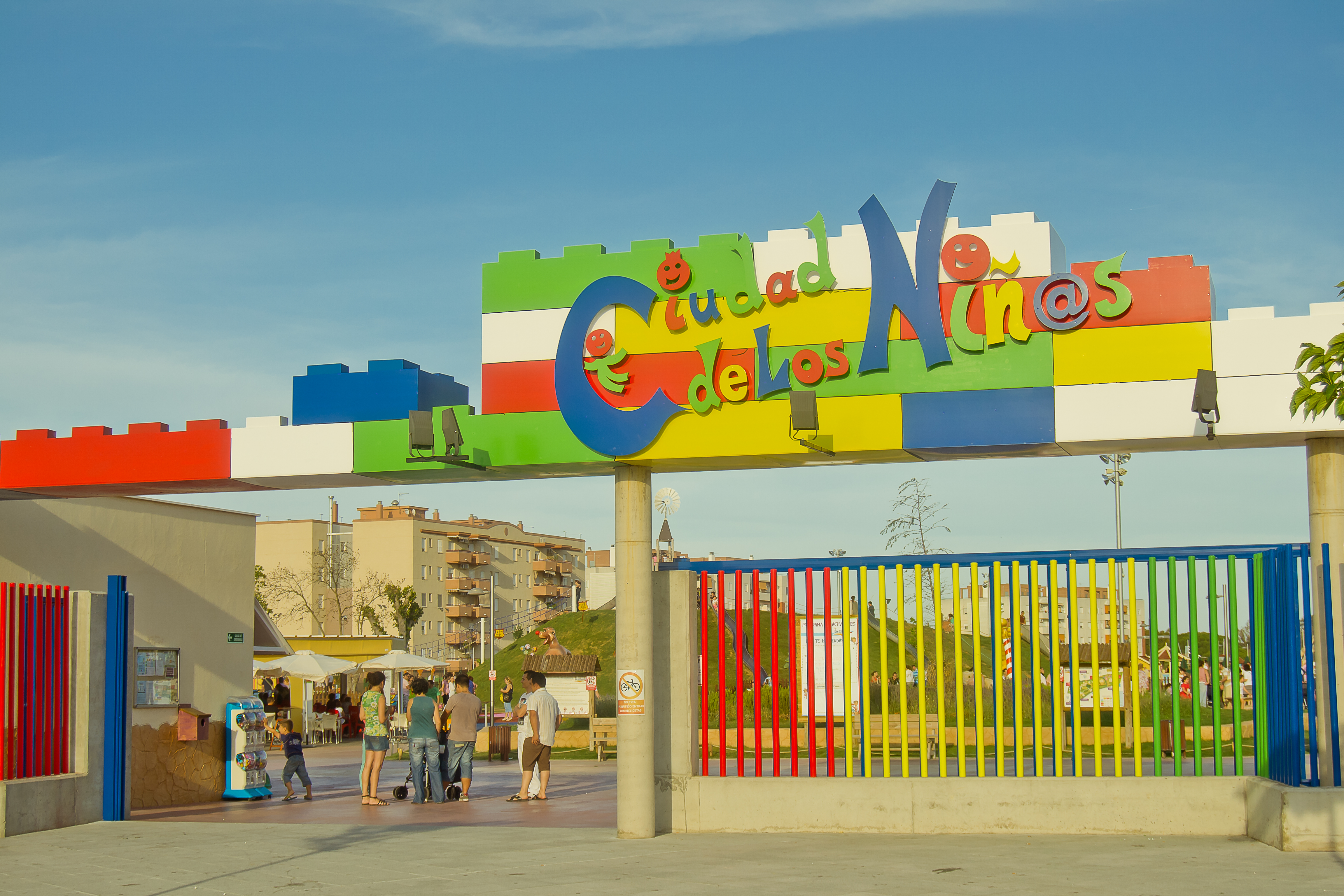 Parque temñatico Ciudad de los niños